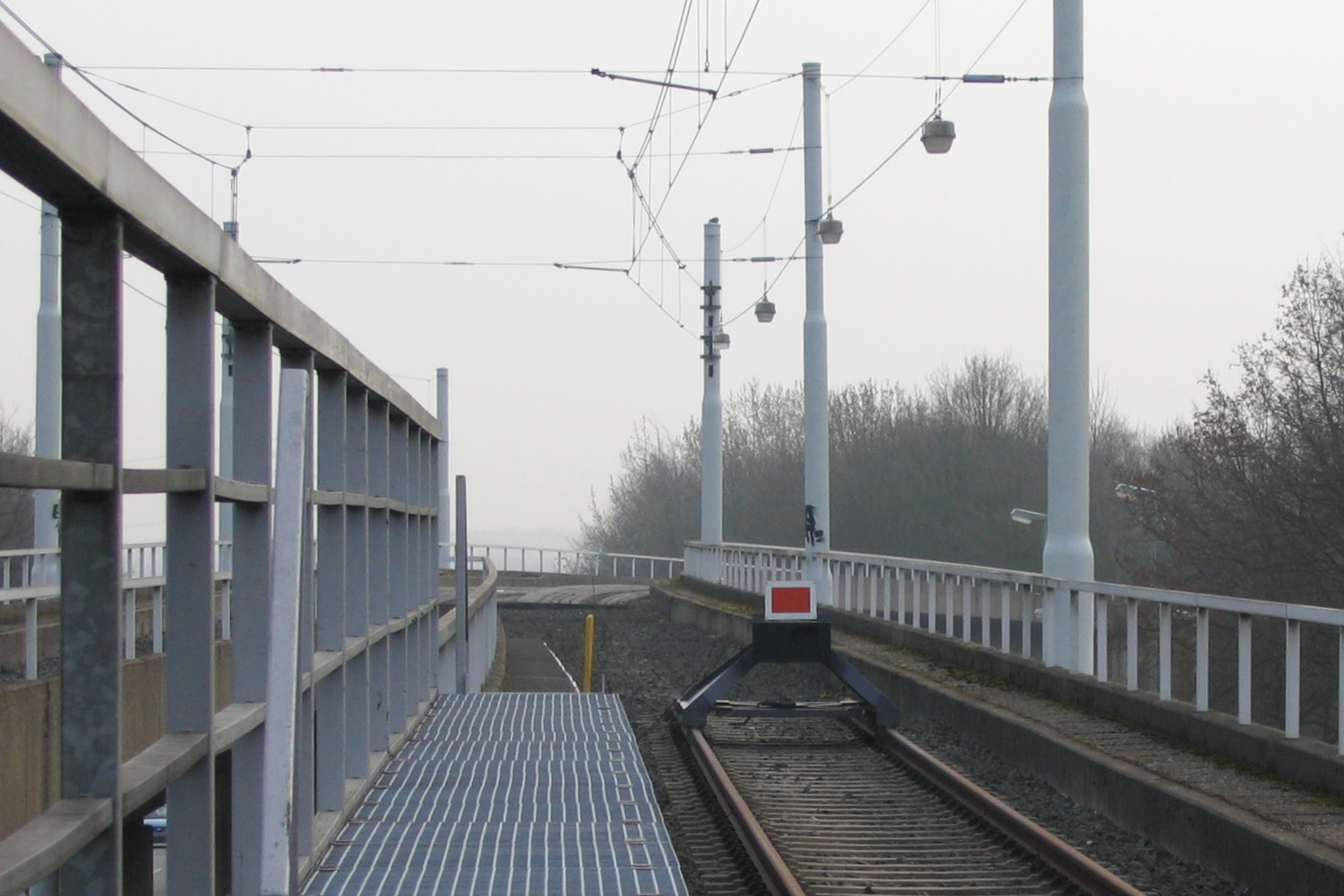 Endhaltestelle der U35 in Bochum mit einer weiterführenden Brücke als Bauvorleistung.